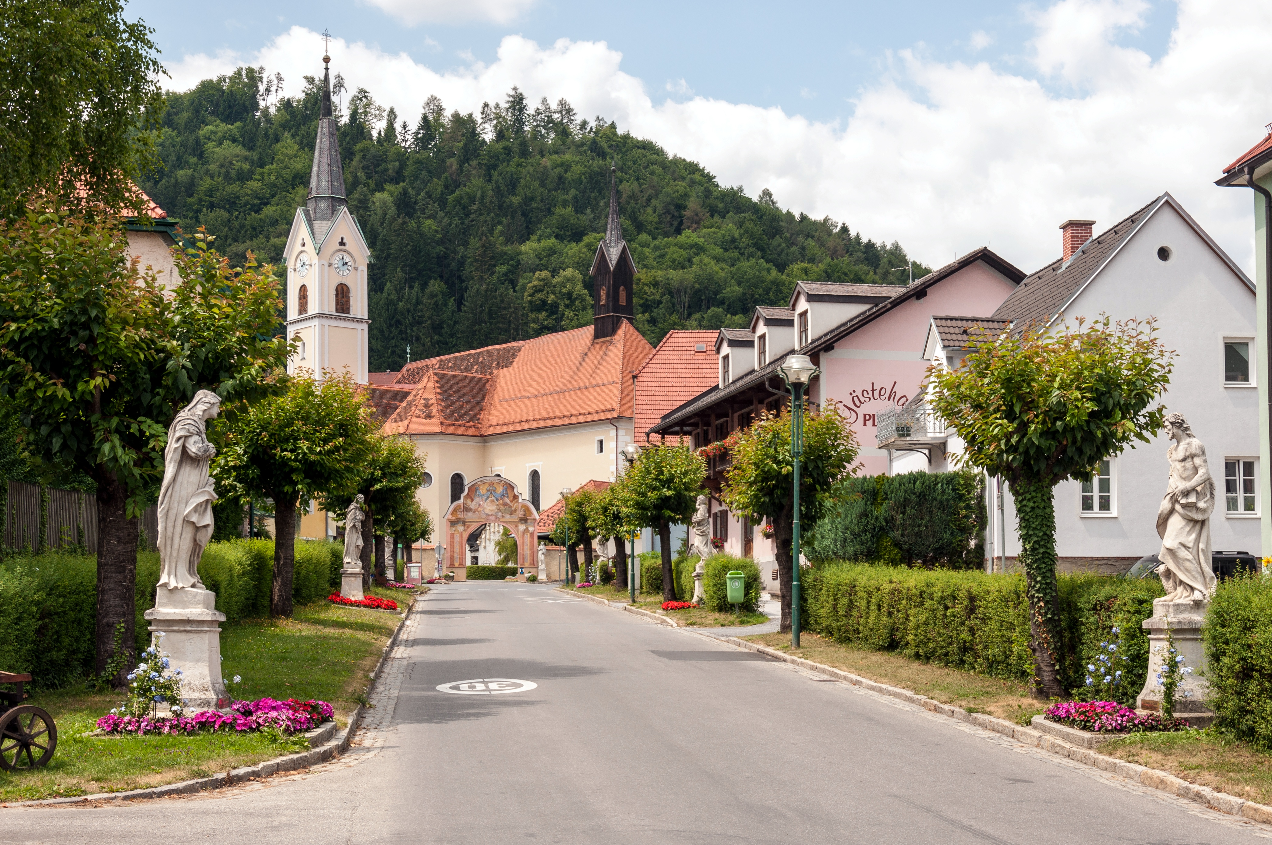 Figurenallee zur Pfarrkirche